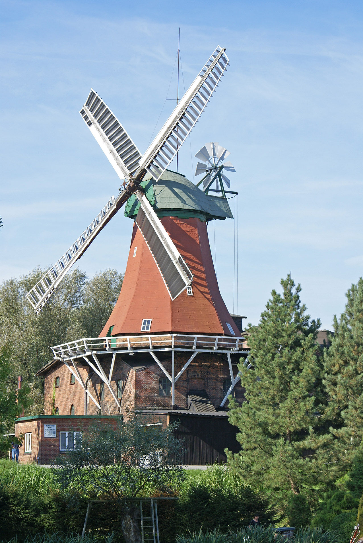 Reitbrooker Mühle im Hamburger Stadtteil Reitbrook im Bezirk Bergedorf This is a photograph of an architectural monument.